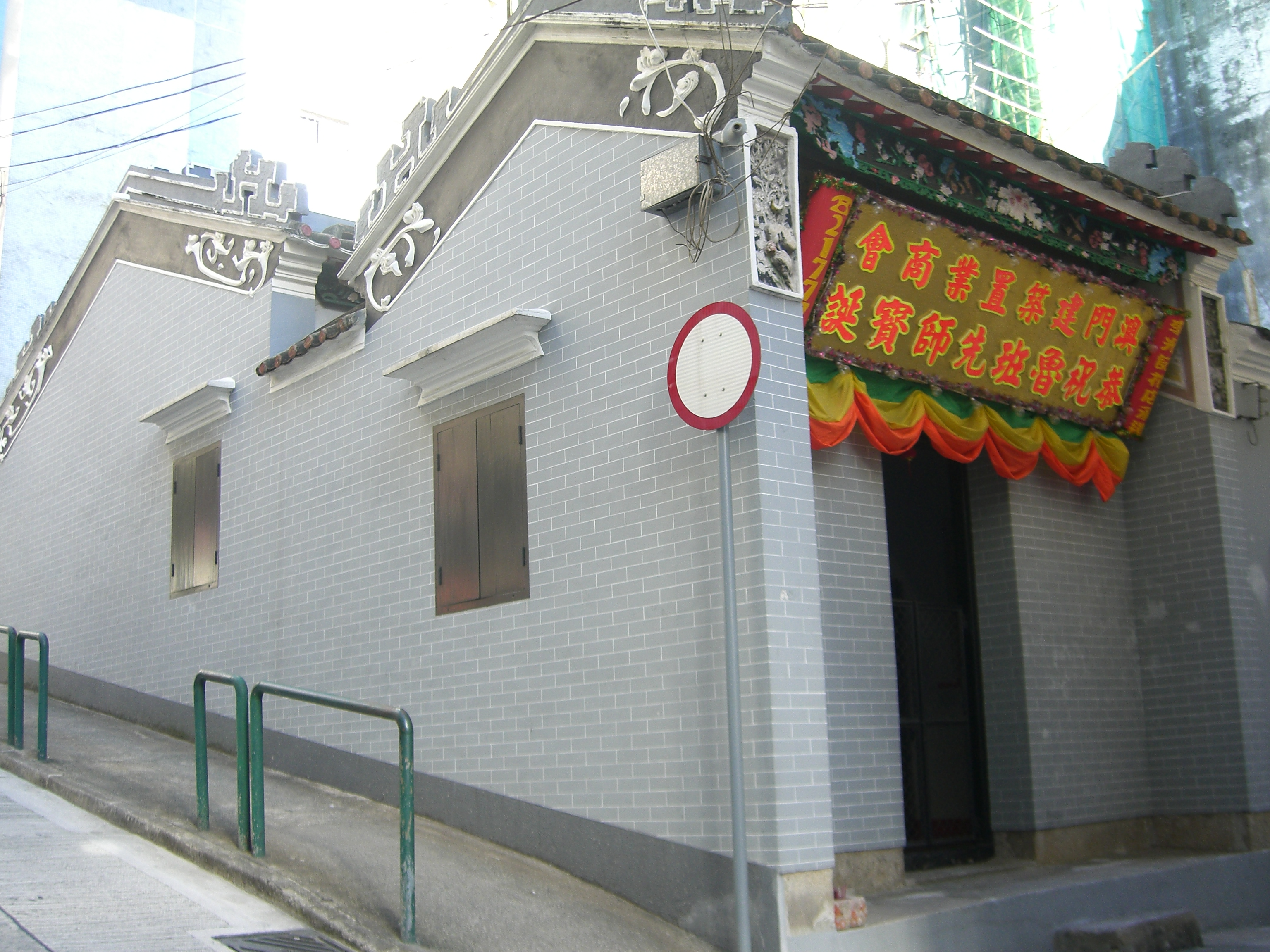 Templo de Lou Pan Si Fu